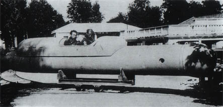 maiale ssb